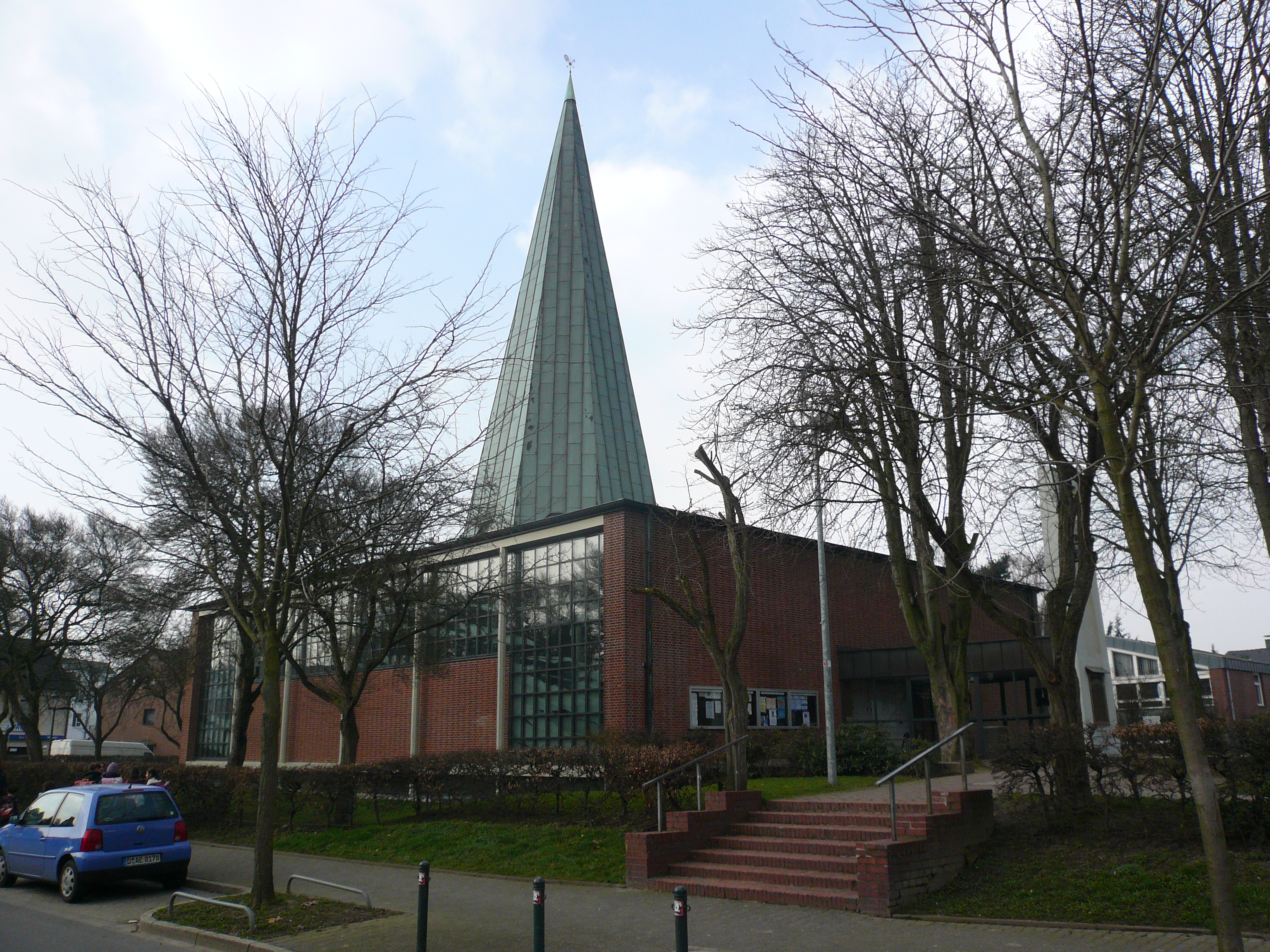 röm.-kath. Gemeinde St. Maria Königin in Düsseldorf-Lichtenbroich